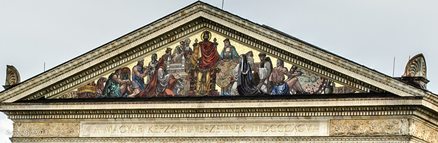 Выставочный зал Мючарнок